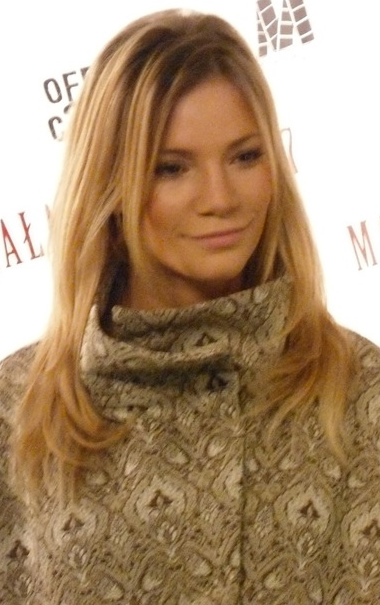 Maja Bohosiewicz podczas międzynarodowego festiwalu kina niezależnego Off Plus Camera 2011 w Krakowie.